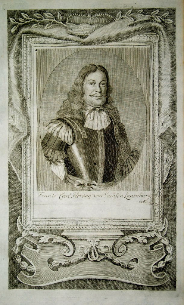 Frantz Carl Herzog von Sachsen-Lauenburg (1594-1669). Zunächst im schwedischen Kriegsdienst und, nachdem er von General Pappenheim gefangen genommen worden war, kaiserlicher General-Wachtmeister